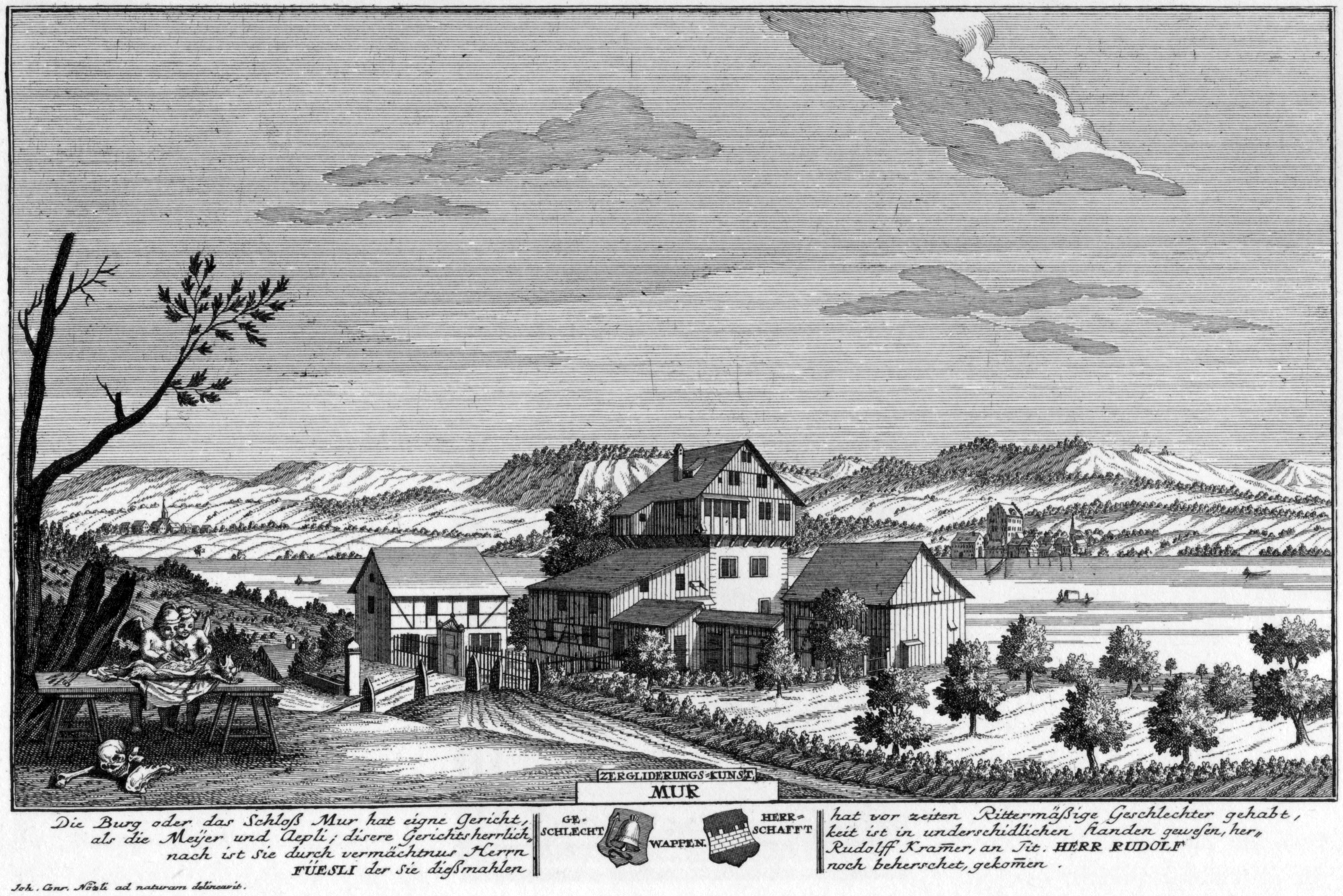 Das Schloss Maur 1742. Radierung von David Herrliberger nach einer Tuschezeichnung von Hans Conrad Nözli. Erschienen in Eigentliche Vorstellung der Adelichen Schlösser im Zürich Gebieth, Blatt 12, Zweite Lieferung 1743